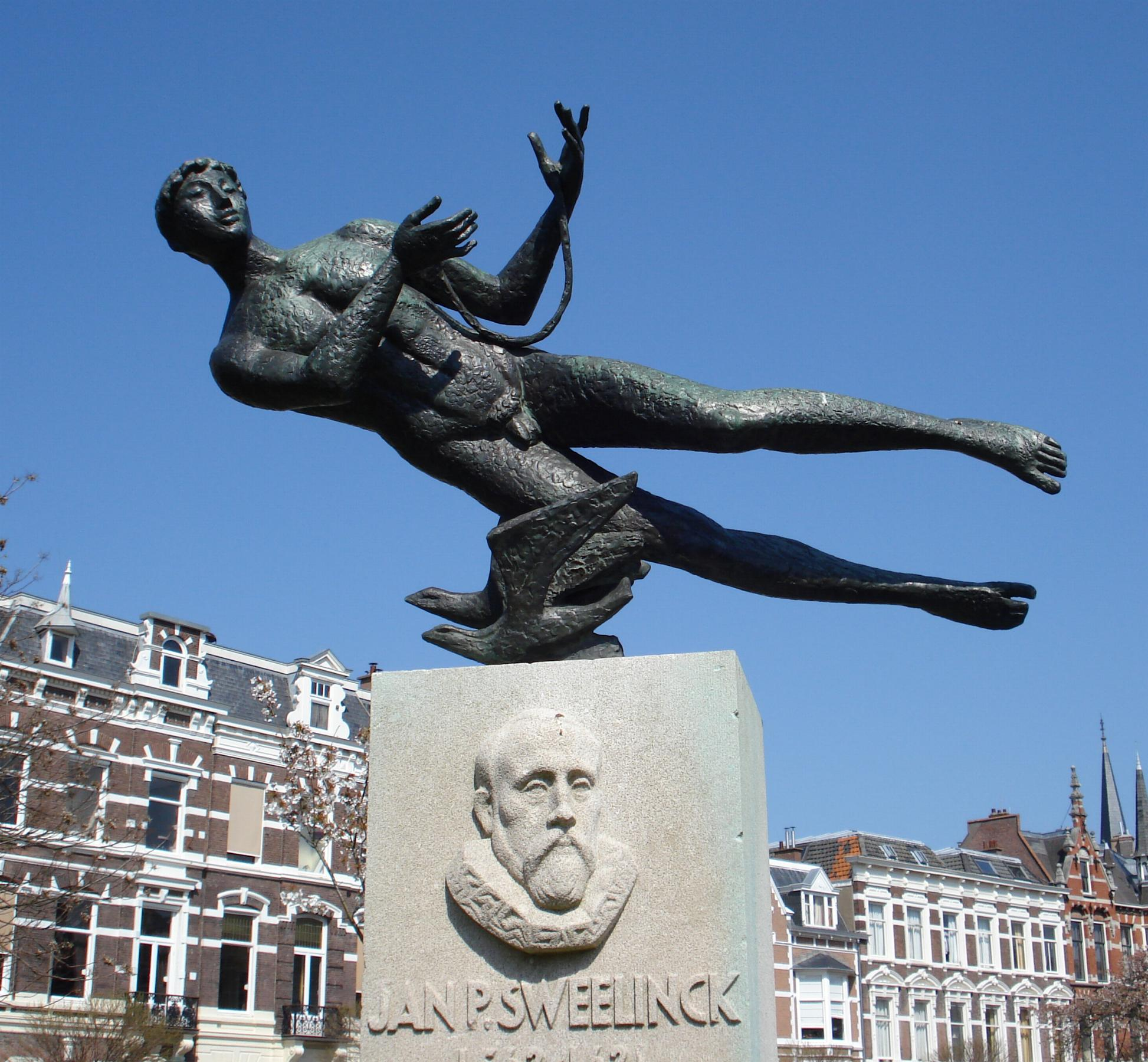 Den Haag, Sweelinckplein. Monument J.P. Sweelinck van Dirk Bus. The Hague/The Netherlands.